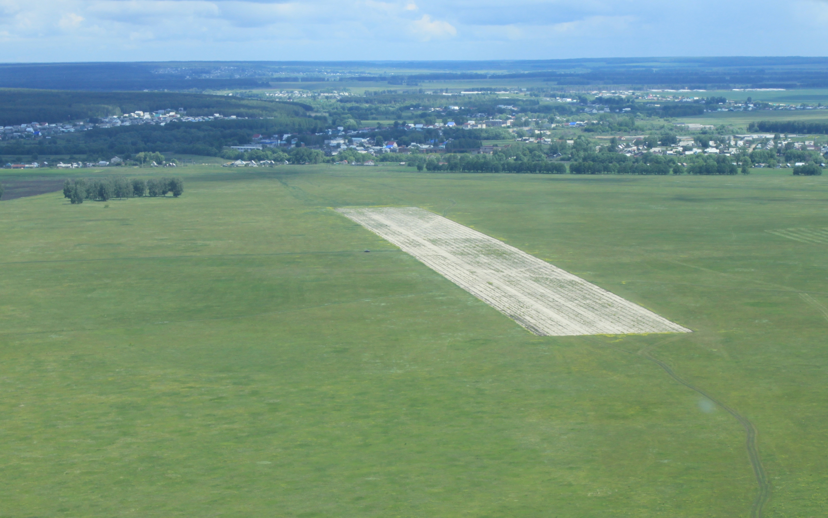 Общий вид ИВПП-02/20